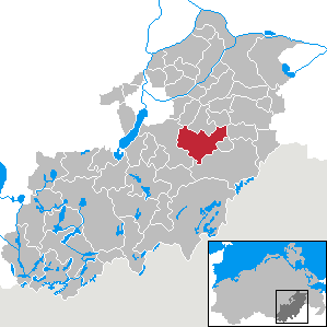 Lindetal in Mecklenburg-Vorpommern, Landkreis Mecklenburg-Strelitz